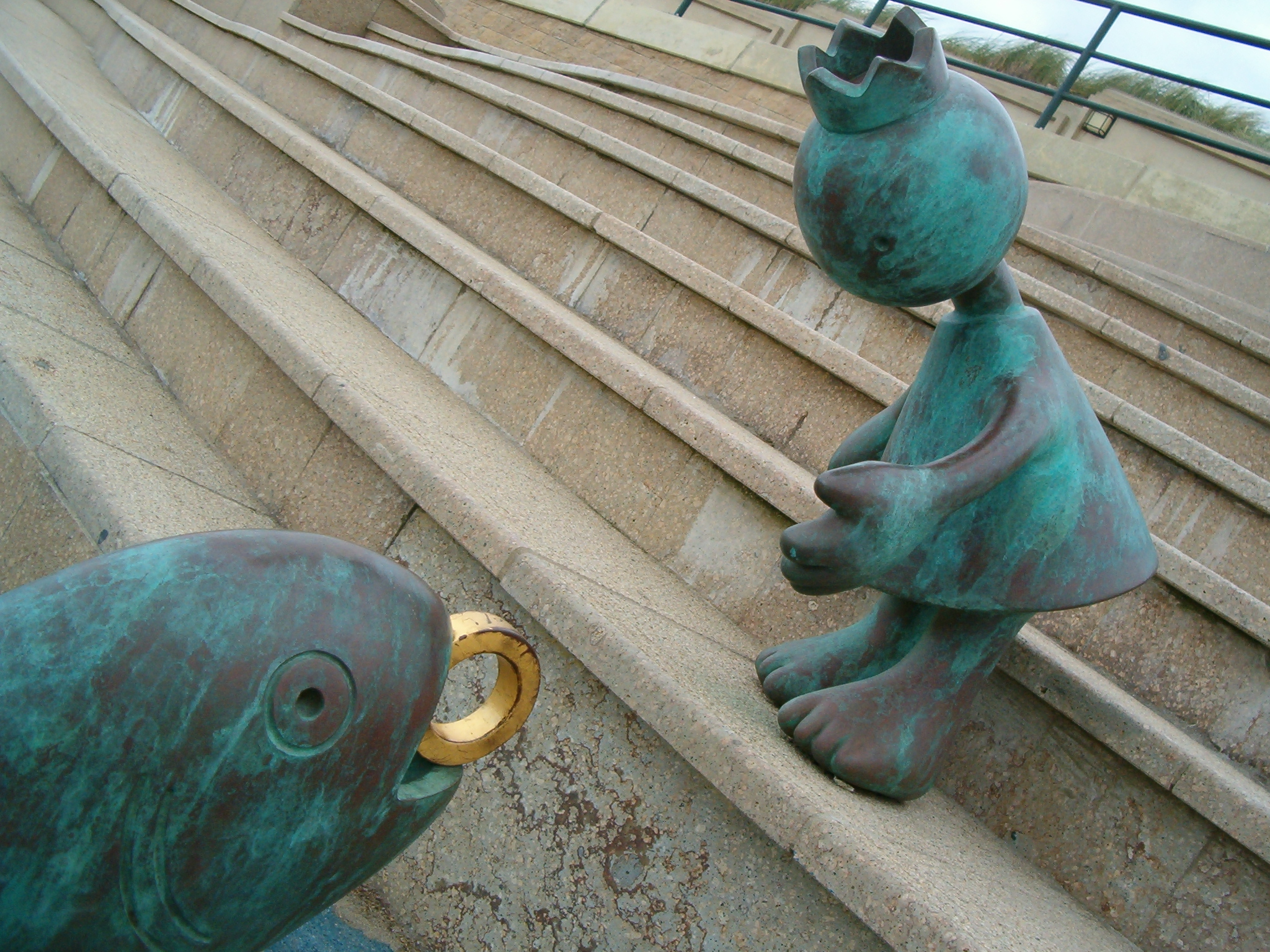 Beelden aan zee in Scheveningen, Netherlands "Queen with a Magic Fish" by Tom Otterness